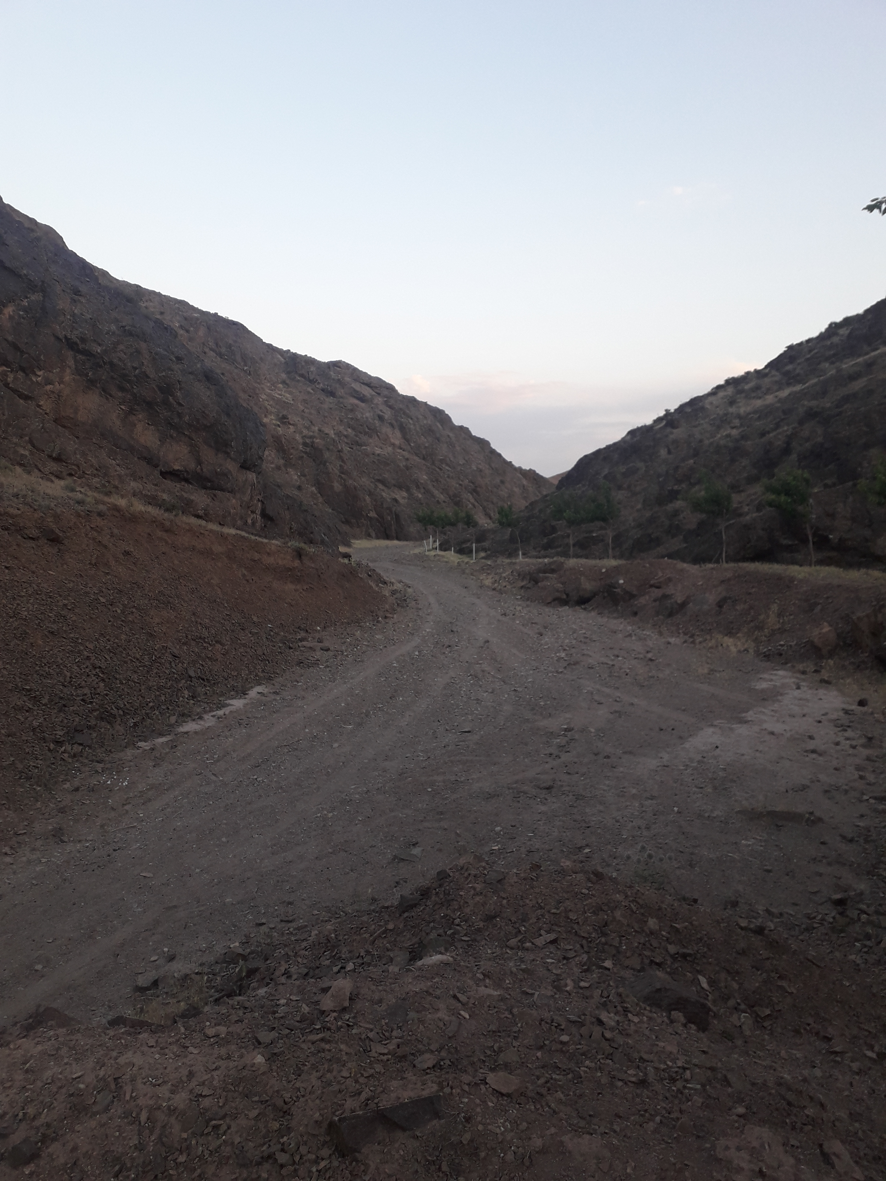 باغ دره ی گلمران